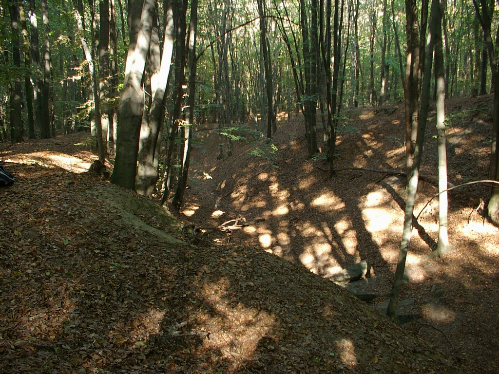 Rezerwat przyrody "Parowy Janinowskie" Nature Reserve "Janinów Ravines" author: Bogdan Janus, Łódź, Poland